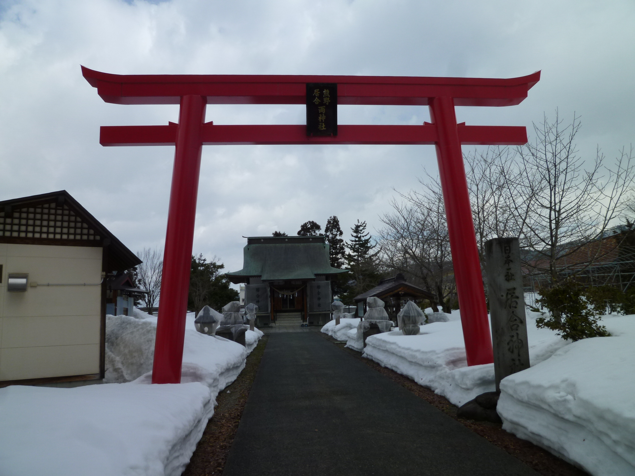 熊野居合両神社鳥居と拝殿。山形県村山市林崎に所在。通称居合神社。